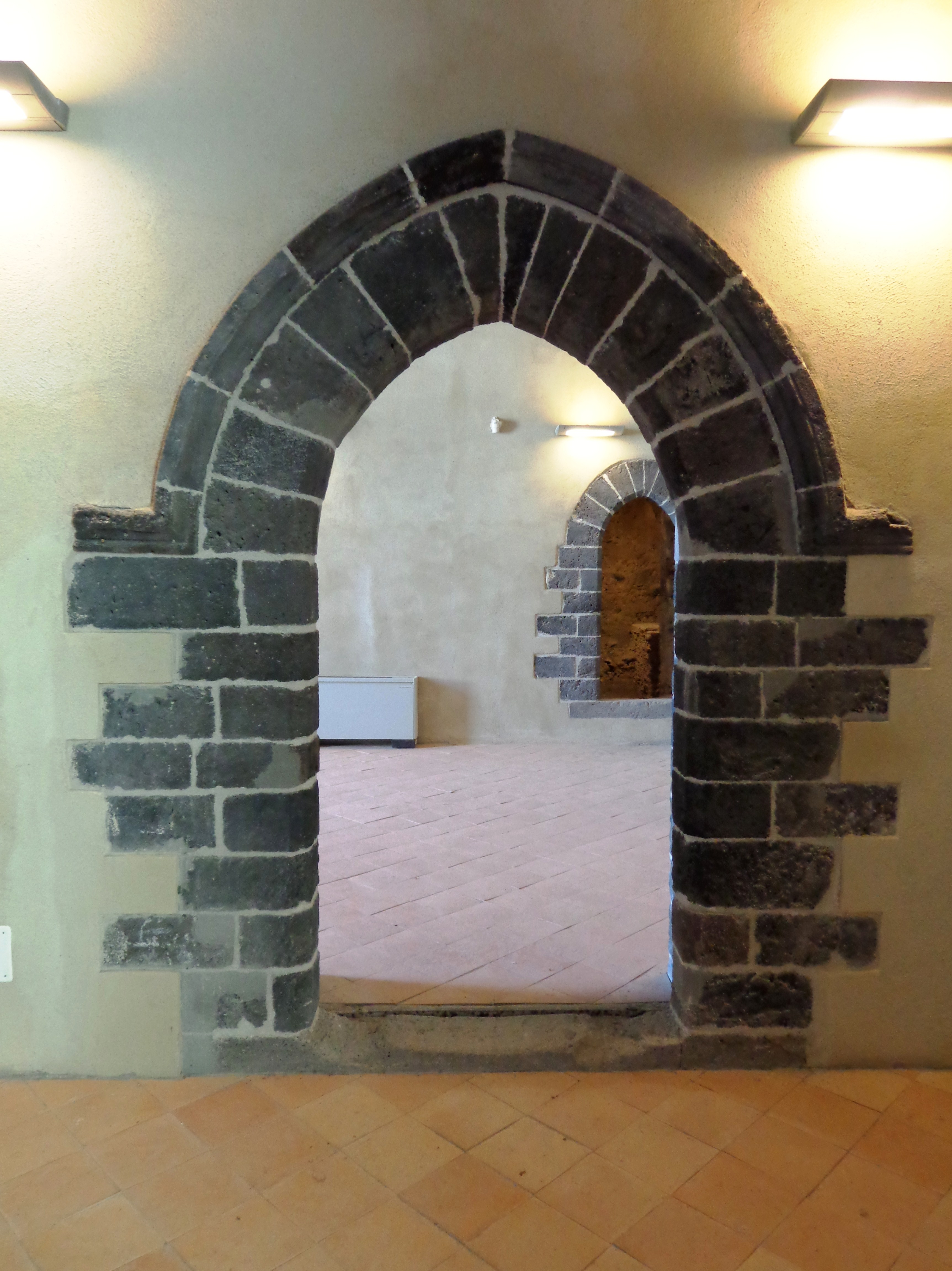 Portale lavico interno